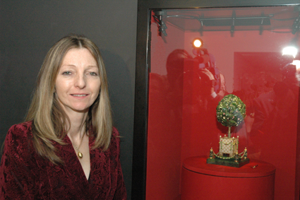 Sarah Fabergé at Fabergé exhibition in Brussels, December 2005